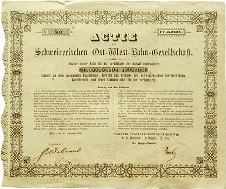 Aktie der Schweizerischen Ost-West-Bahn-Gesellschaft